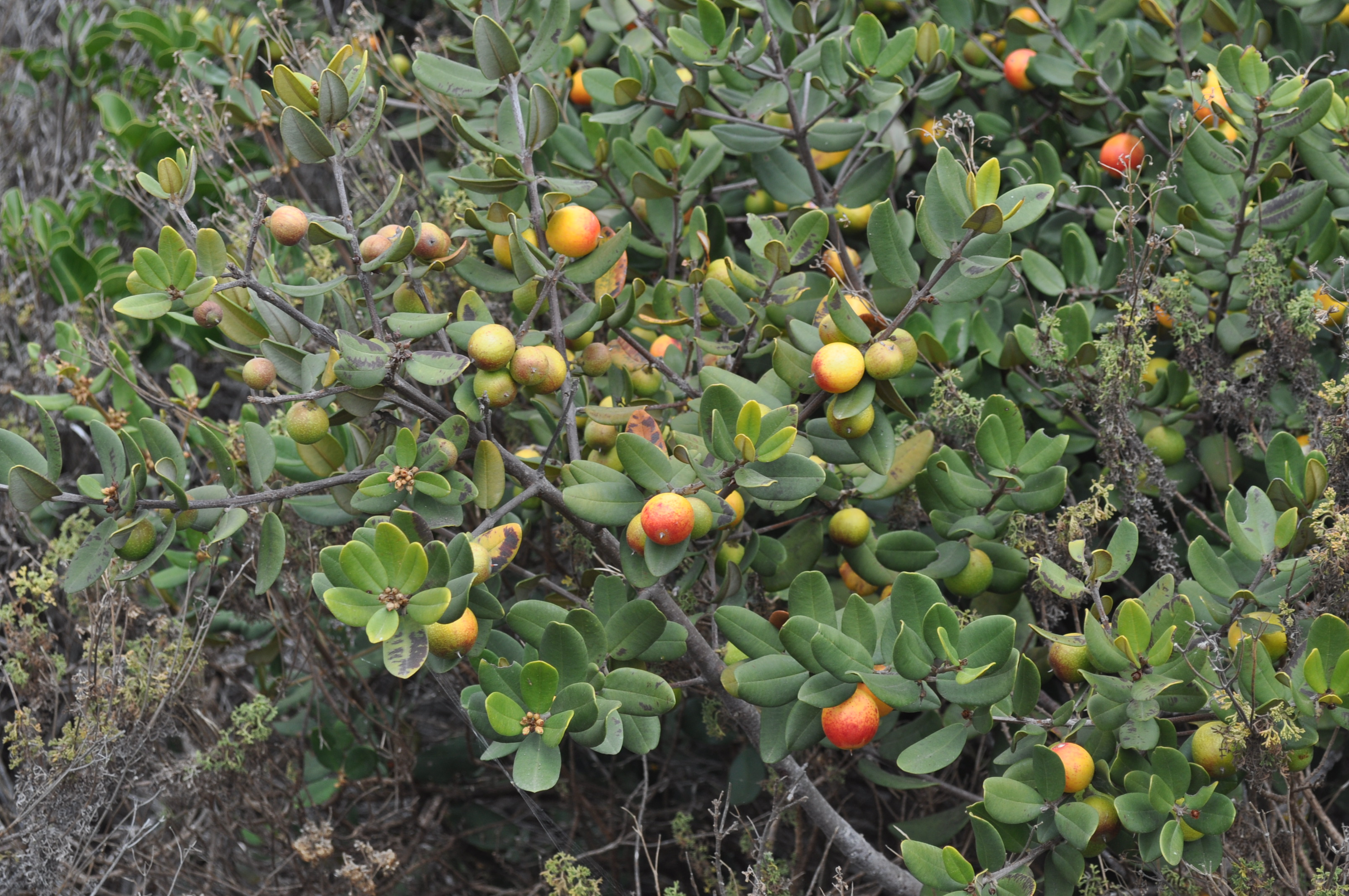 Pouteria splendens, también llamado "lúcumo chileno". Arbusto endémico y en peligro. Crece sólo en la zona costera de Chile, en la IV y V Regiones. La fotografía es de Los Molles, donde aún existe una apreciable cantidad de ejemplares. En el mes de enero se pueden observar los frutos maduros.